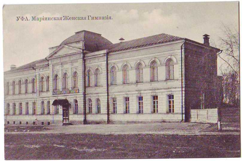 Уфа. Дореволюционные открытки с видами города